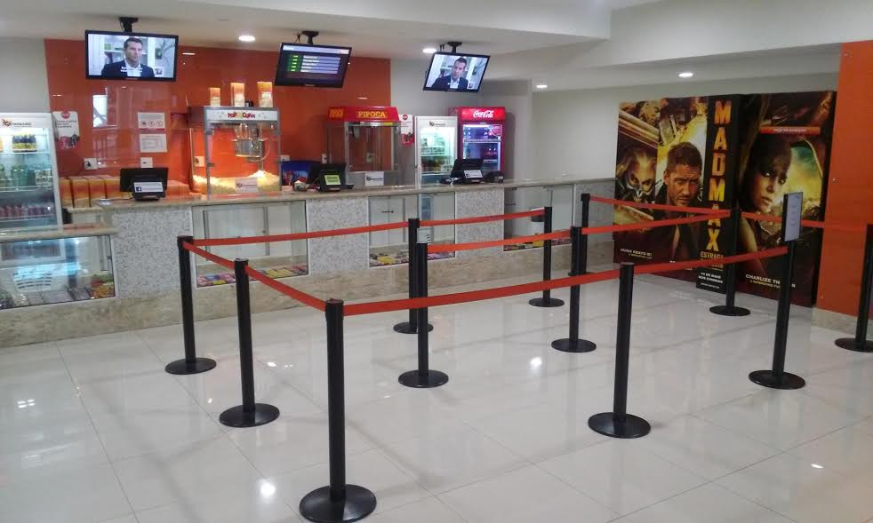 Bomboniere do Cinemagic Norte Sul de Vitória